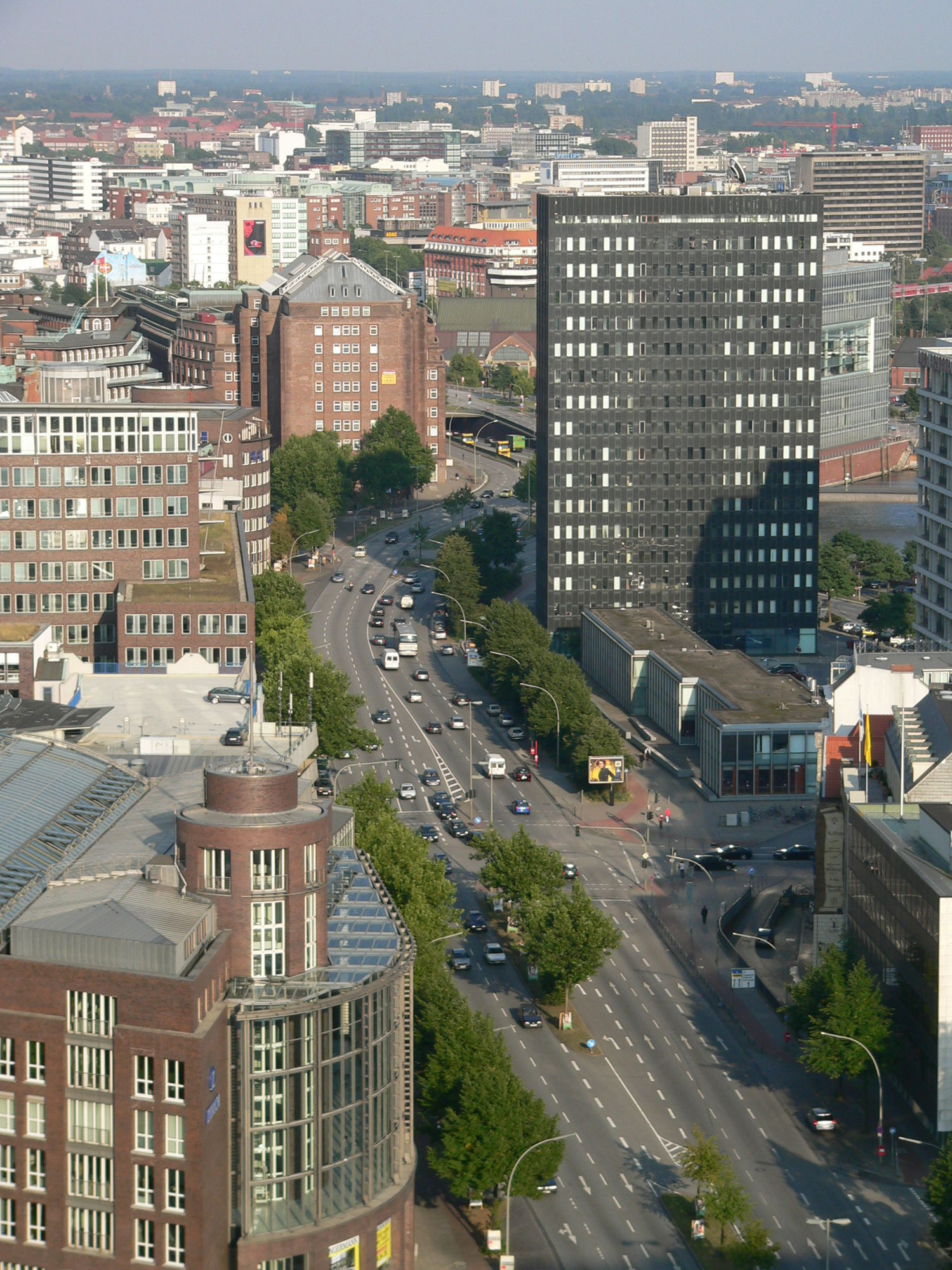 östlicher Teil der Ost-West-Straße, die Willy-Brandt-Straße, aufgenommen von St. Nikolai